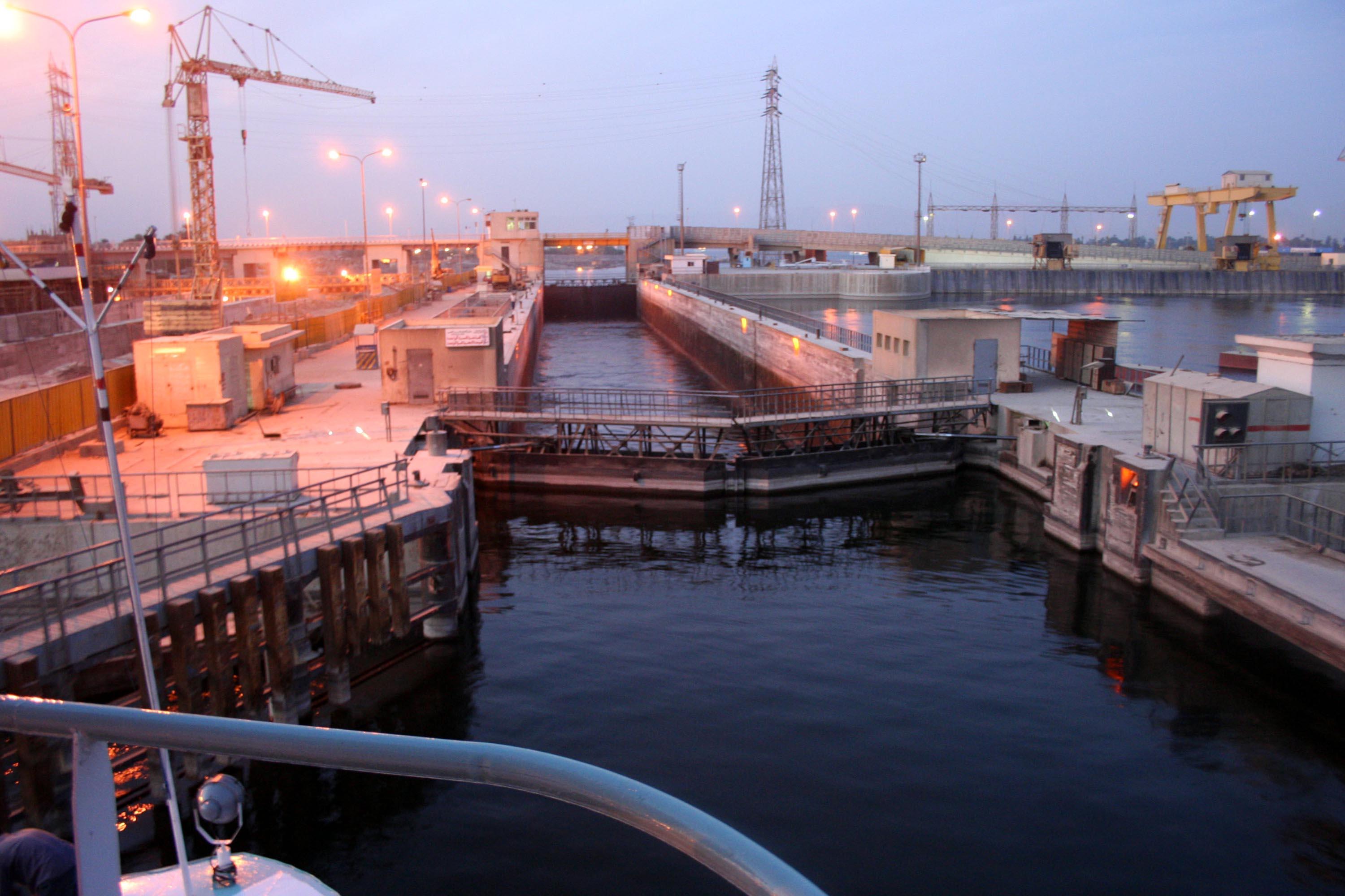 Écluse sur le Nil, Égypte